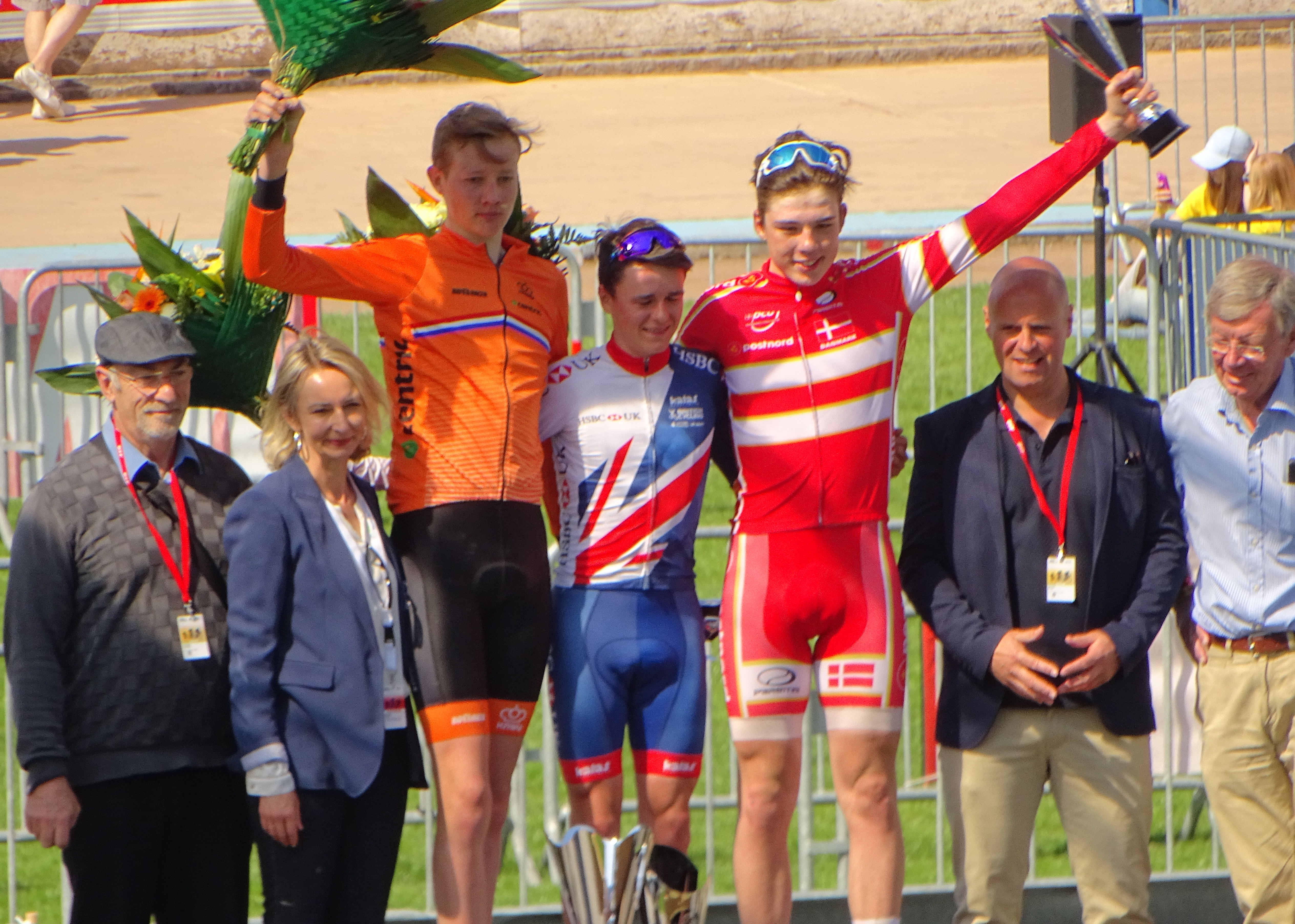 Reportage réalisé le dimanche 9 avril à l'occasion de l'arrivée du Paris-Roubaix juniors et du Paris-Roubaix 2017 à Roubaix, France.